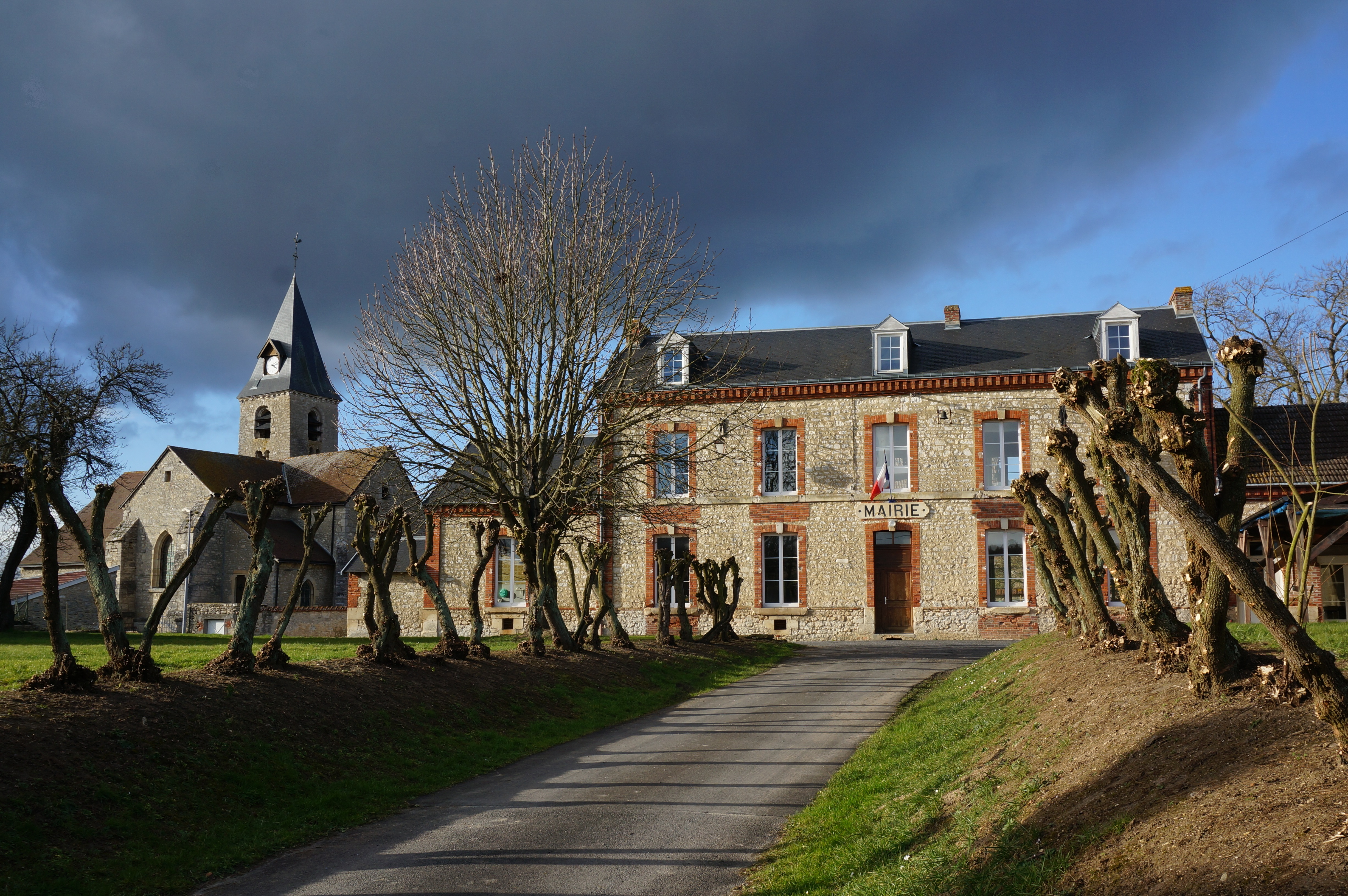 Vues de Bouvancourt.